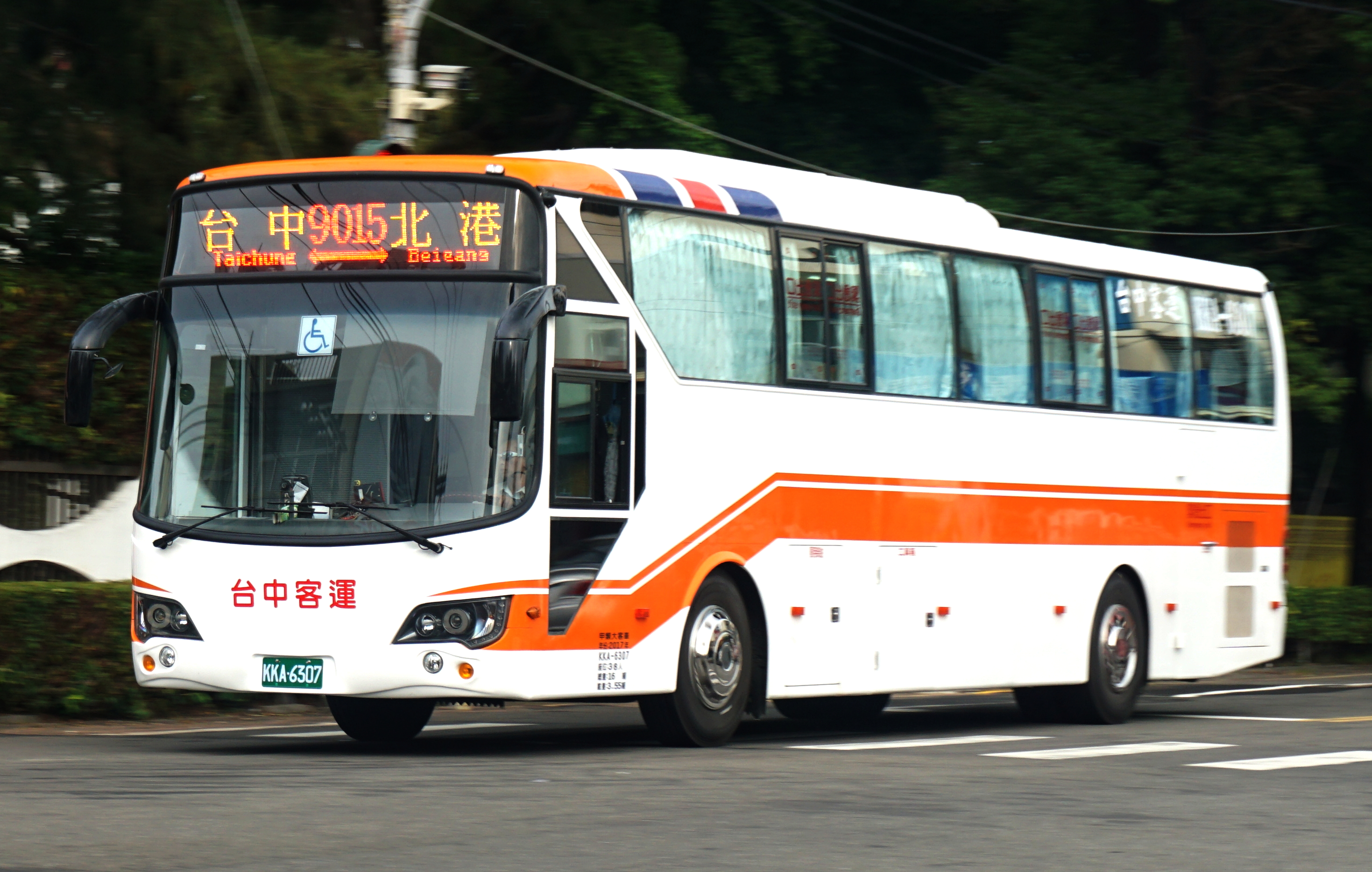 臺中客運2017年大客車KKA-6307行駛9015路線。